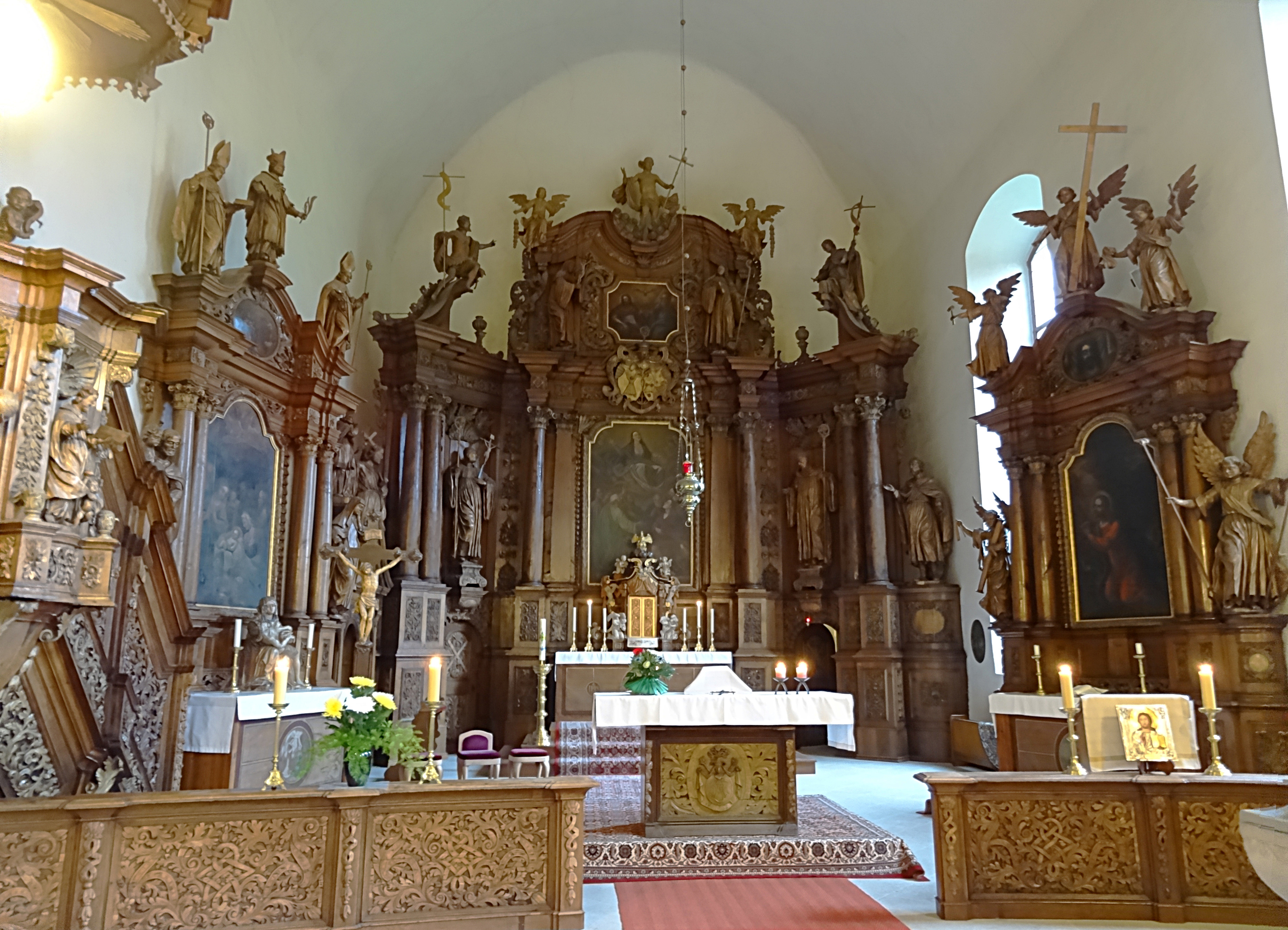 Altar Details in der Klosterkirche St. Andreas zu Meyendorf